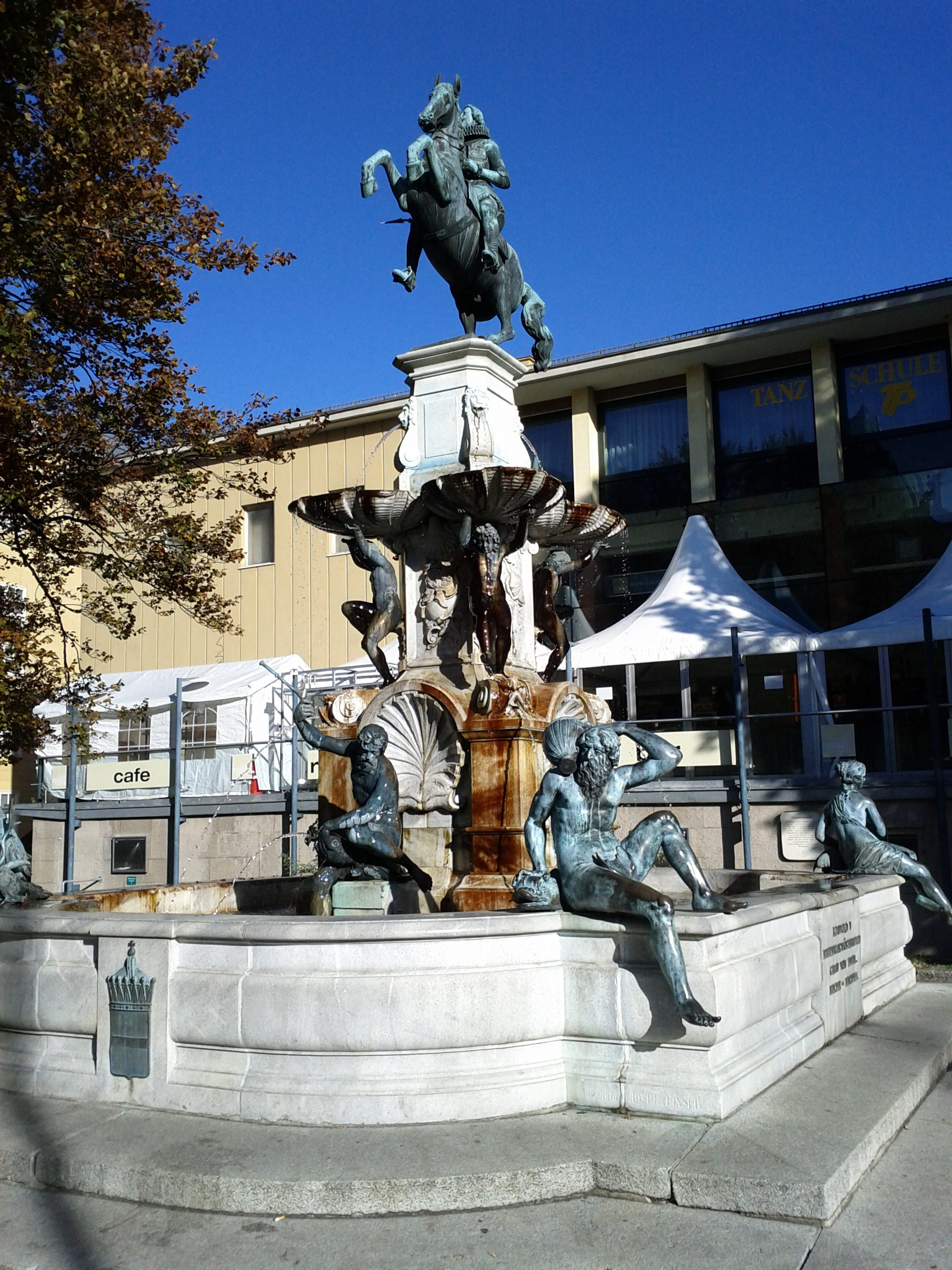 Leopoldsbrunnen: Rennweg in Innsbruck